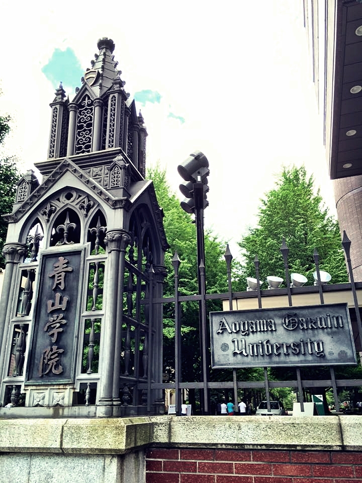 조선말: 아오야마 가쿠인 대학